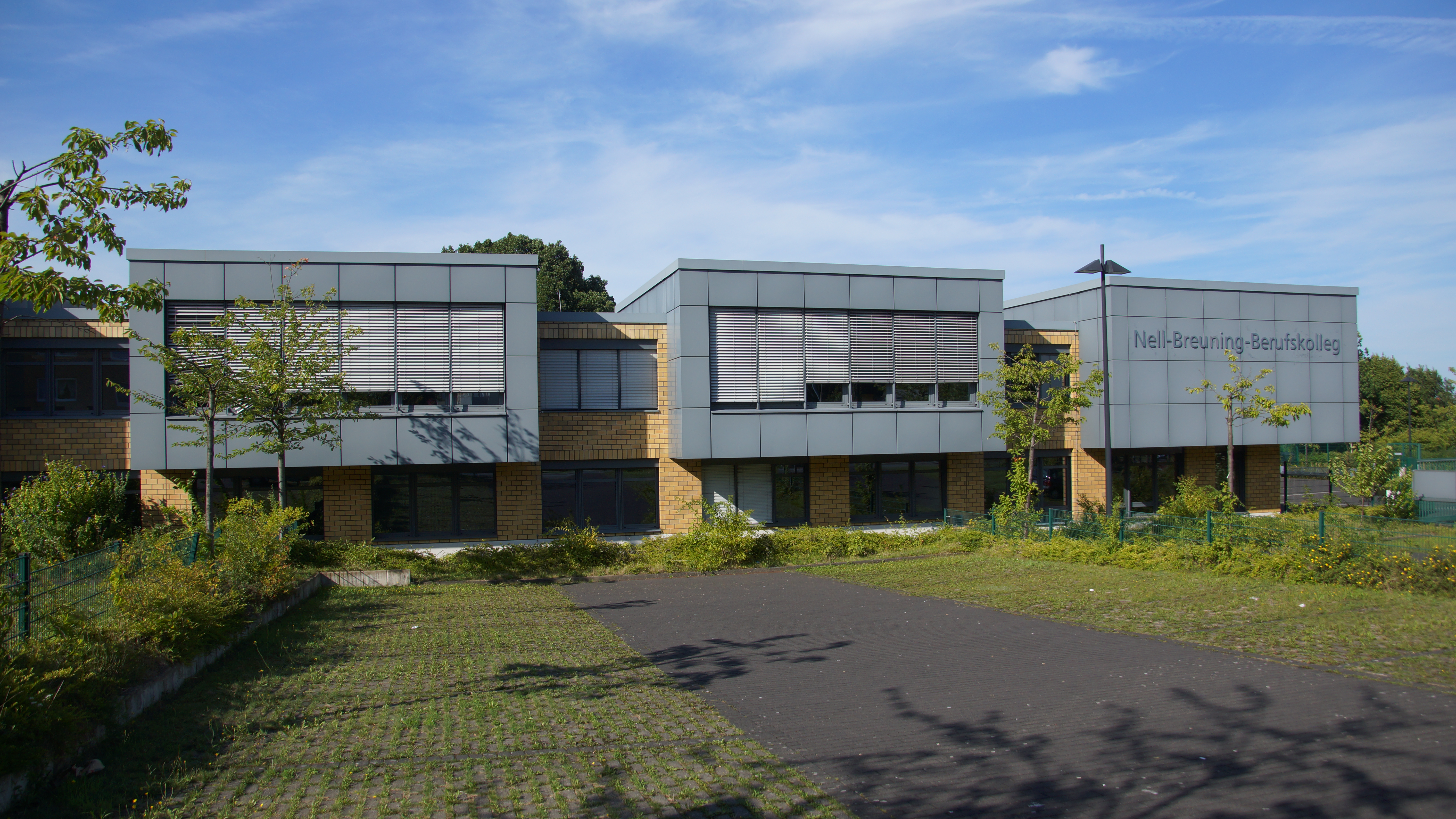 Nell-Breuning-Berufskolleg des Rhein-Erft-Kreises zur Ausbildung als Kaufmann für Bürokommunikation sowie als Wirtschaftsgymnasium